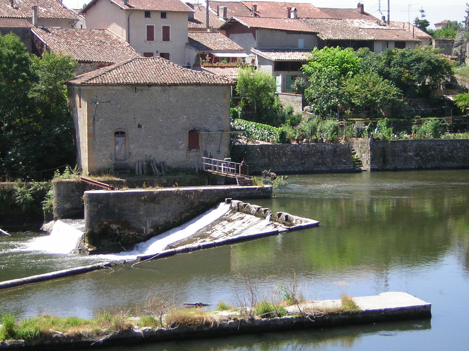 Saint-Martory (Haute-Garonne, France): Seuil sur la Garonne.